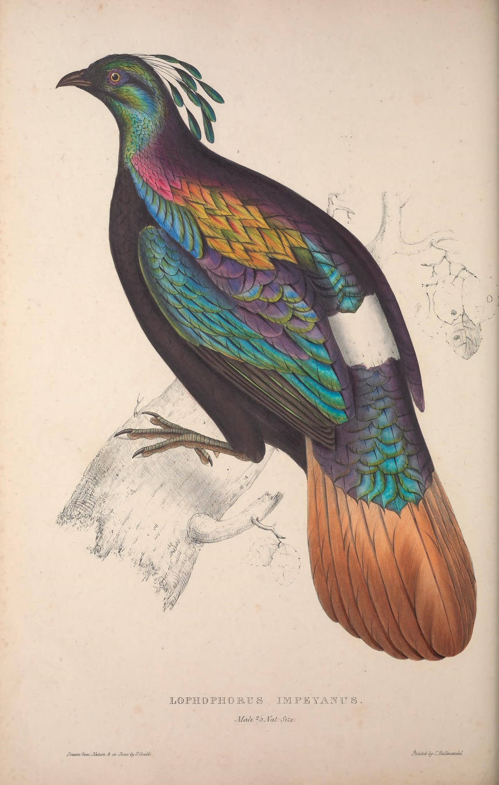 2)rmnv tram- jyk^re/ i^ 07v S6o7ve/ iif S.Goi,(ZcO.